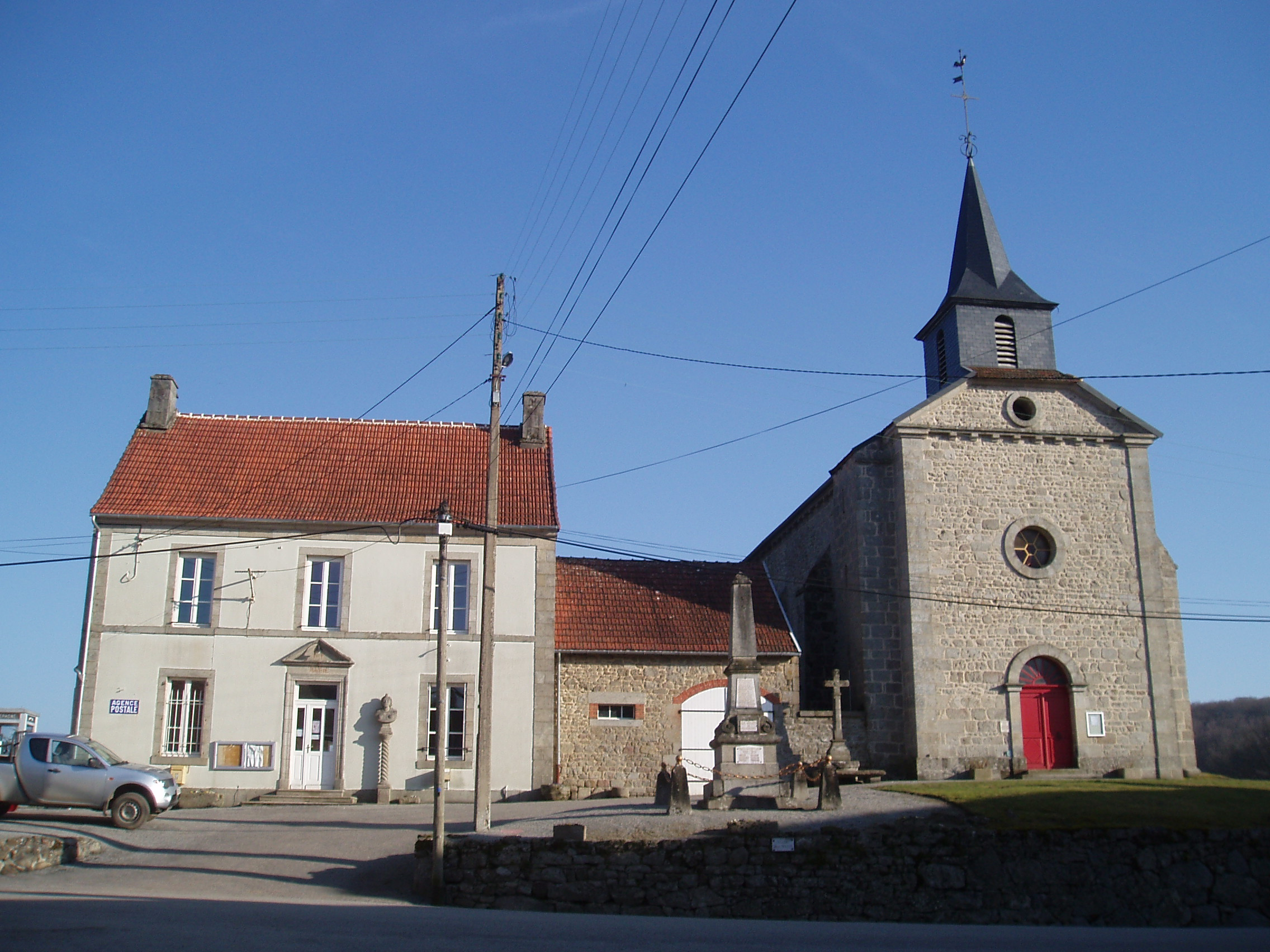 Mairie et église de Fransèches